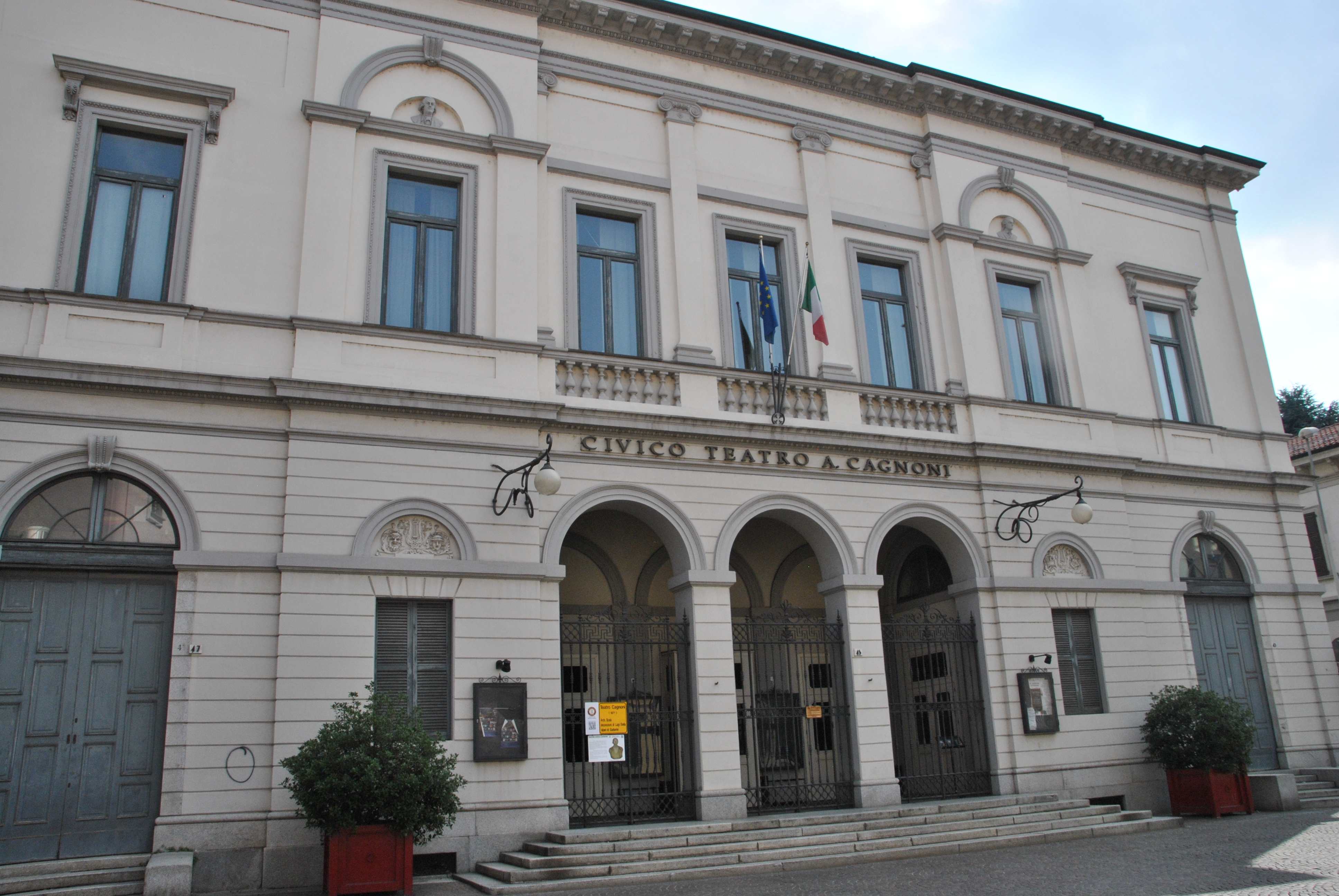 Teatro Cagnoni This is a photo of a monument which is part of cultural heritage of Italy.